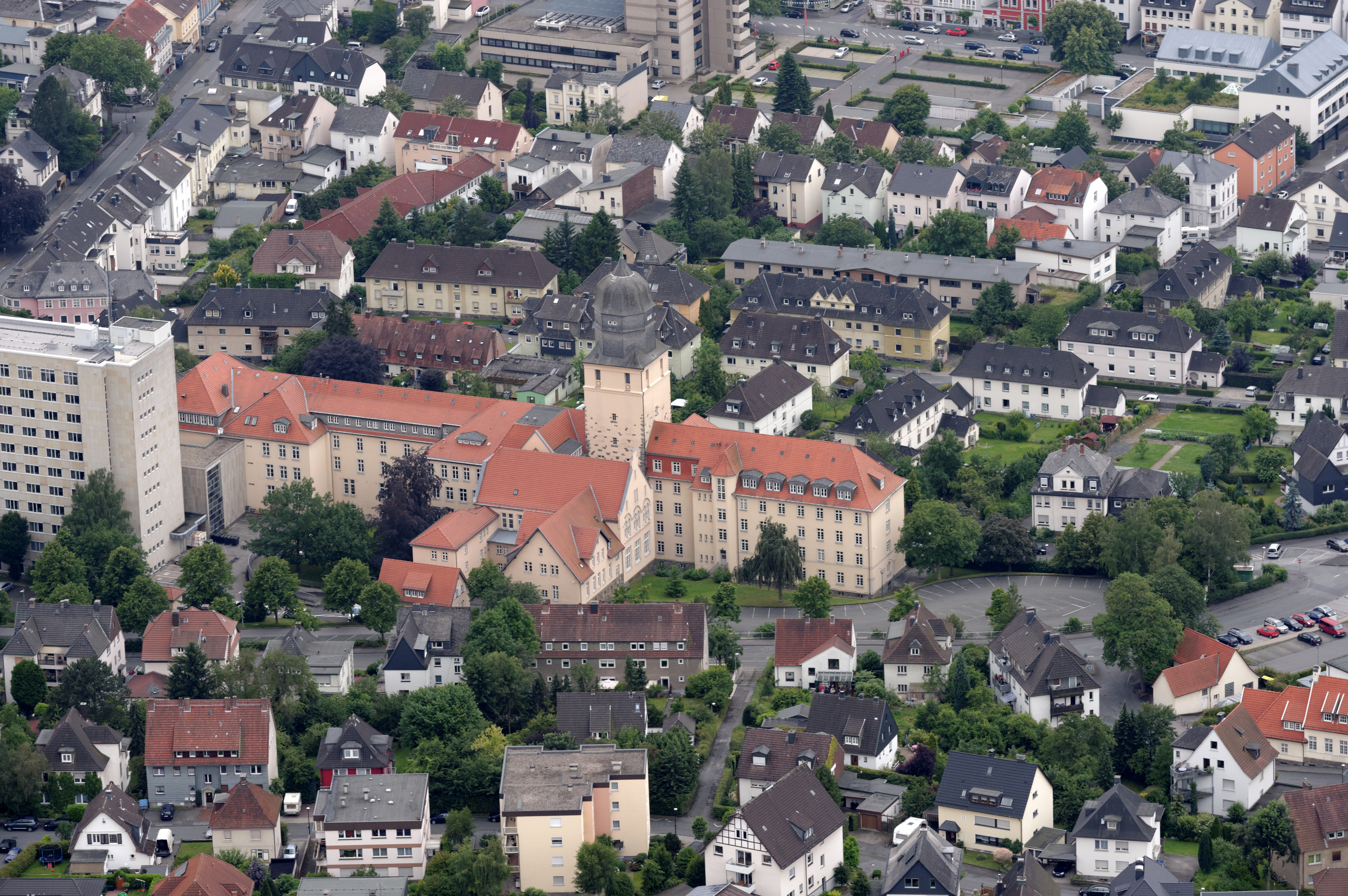 Arnsberg: Altbau der Bezirksregierung, größtenteils abgeschnitten Neubau (Fotoflug Sauerland Nord) The making of this document was supported by the Community-Budget of Wikimedia Germany.